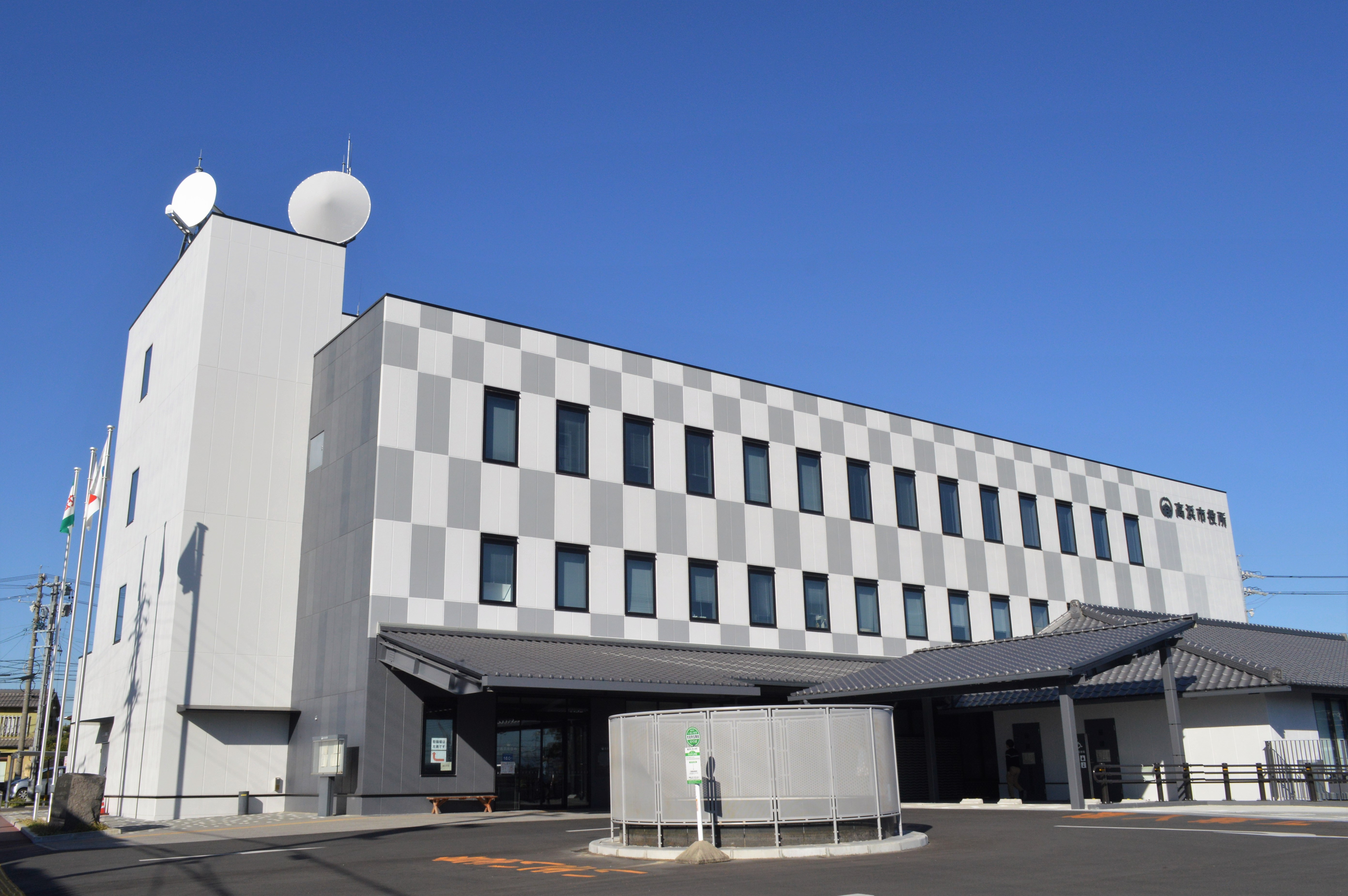 愛知県高浜市の高浜市役所、2017年開庁の新庁舎。